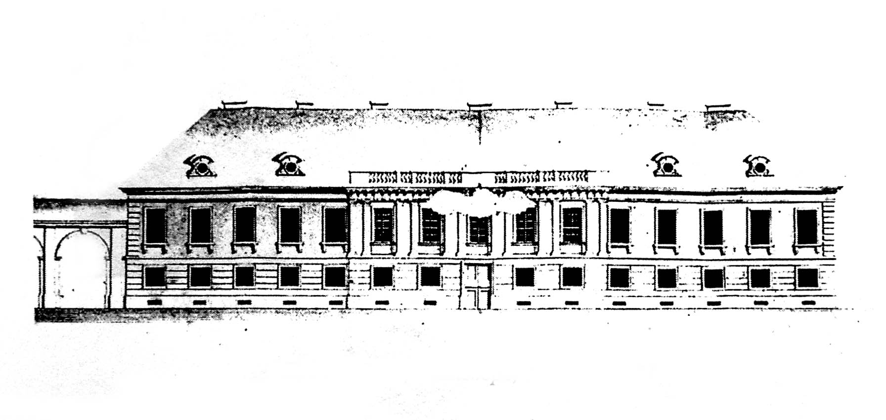 Стара будівля палацу Потоцьких у Львові. Проект 1822 року. Розібрана на початку 1860-х років. Архітектор Ігнаци Хамбрез.